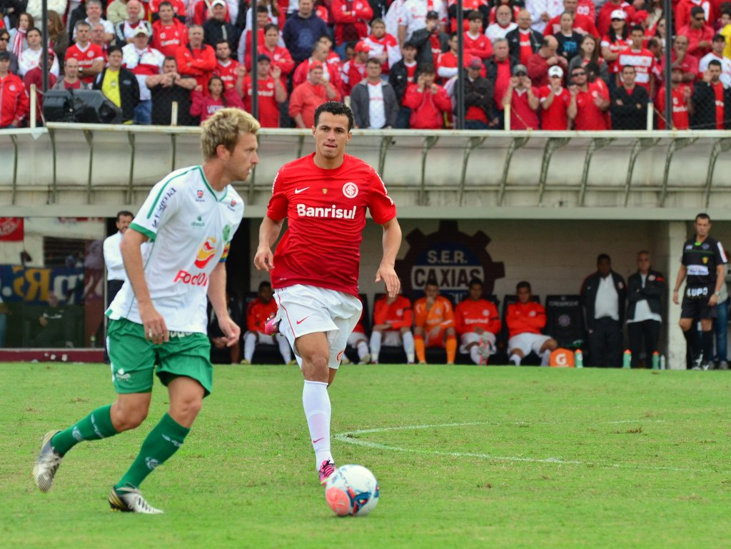 Leandro Damião em ação pelo Inter em 2013